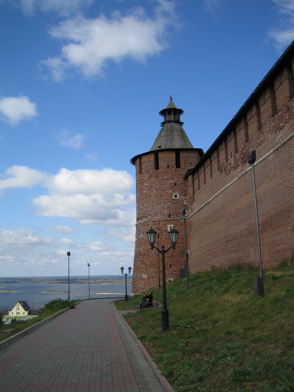 Тайницкая башня (03.09.05)